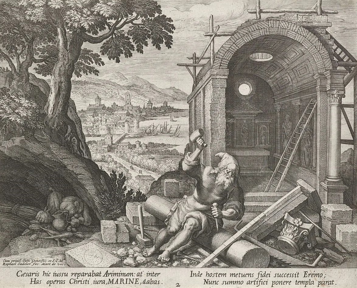 Der heilige Marino bei seiner Arbeit als Steinhauer